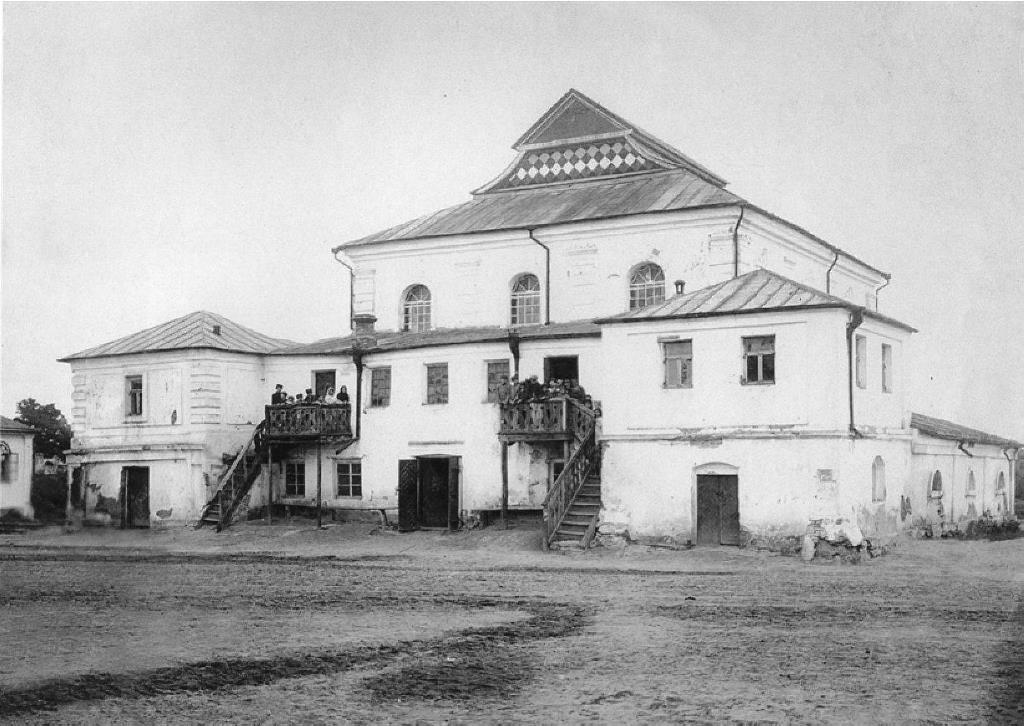 Синагога в Поволочи.